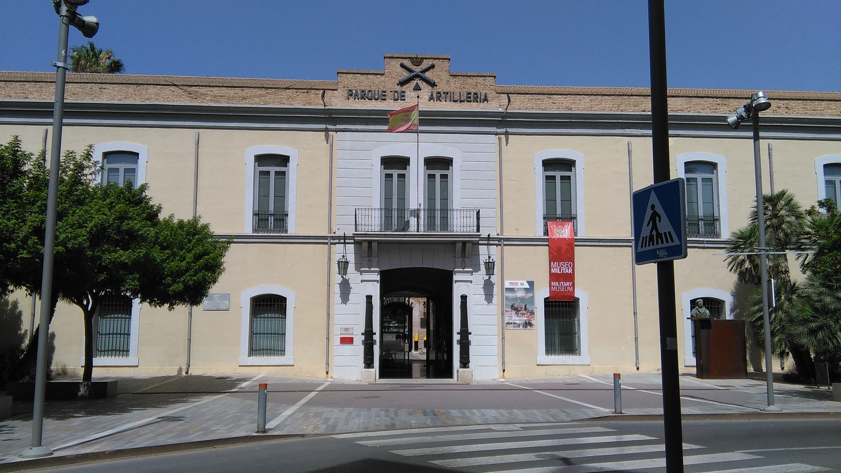 Fachada del Museo de Artillería de Cartagena, provincia de Murcia, España